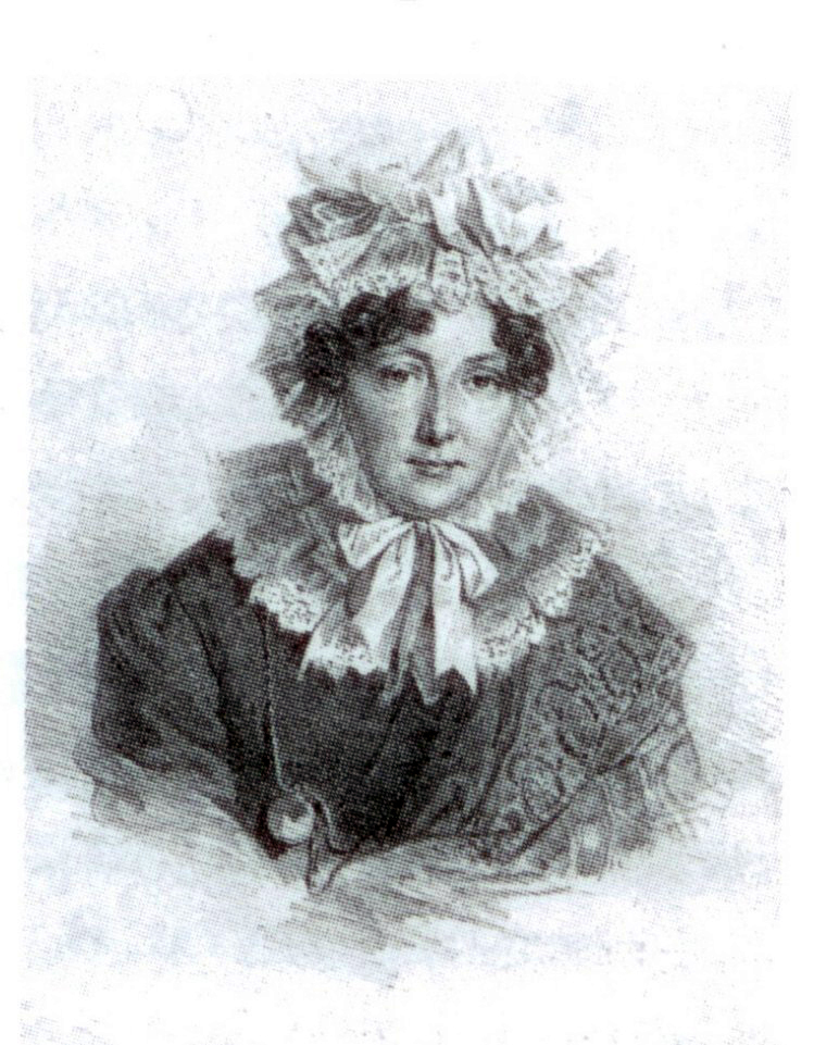 Мария Алексеевна Свистунова (1778-1866), ур. Ржевская. Мать декабриста П.Н.Сивтунова